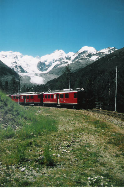 De trein klimt omhoog vanaf Pontresina naar Bernina Hospiz. Hier het begin van de klim met op de achtergrond de Morteratschgletscher.